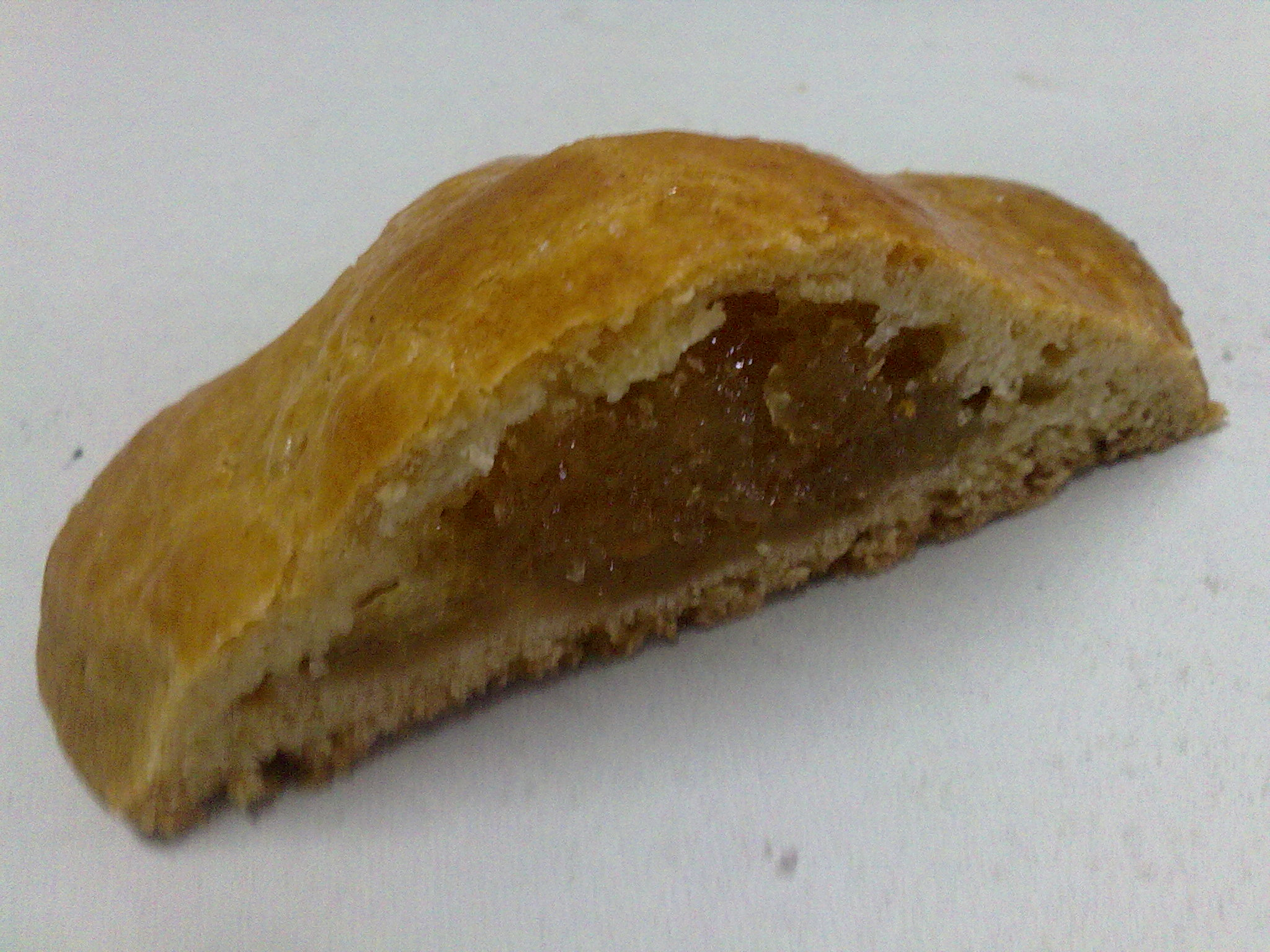 Sección de un dulce de pasta flora y cabello de ángel